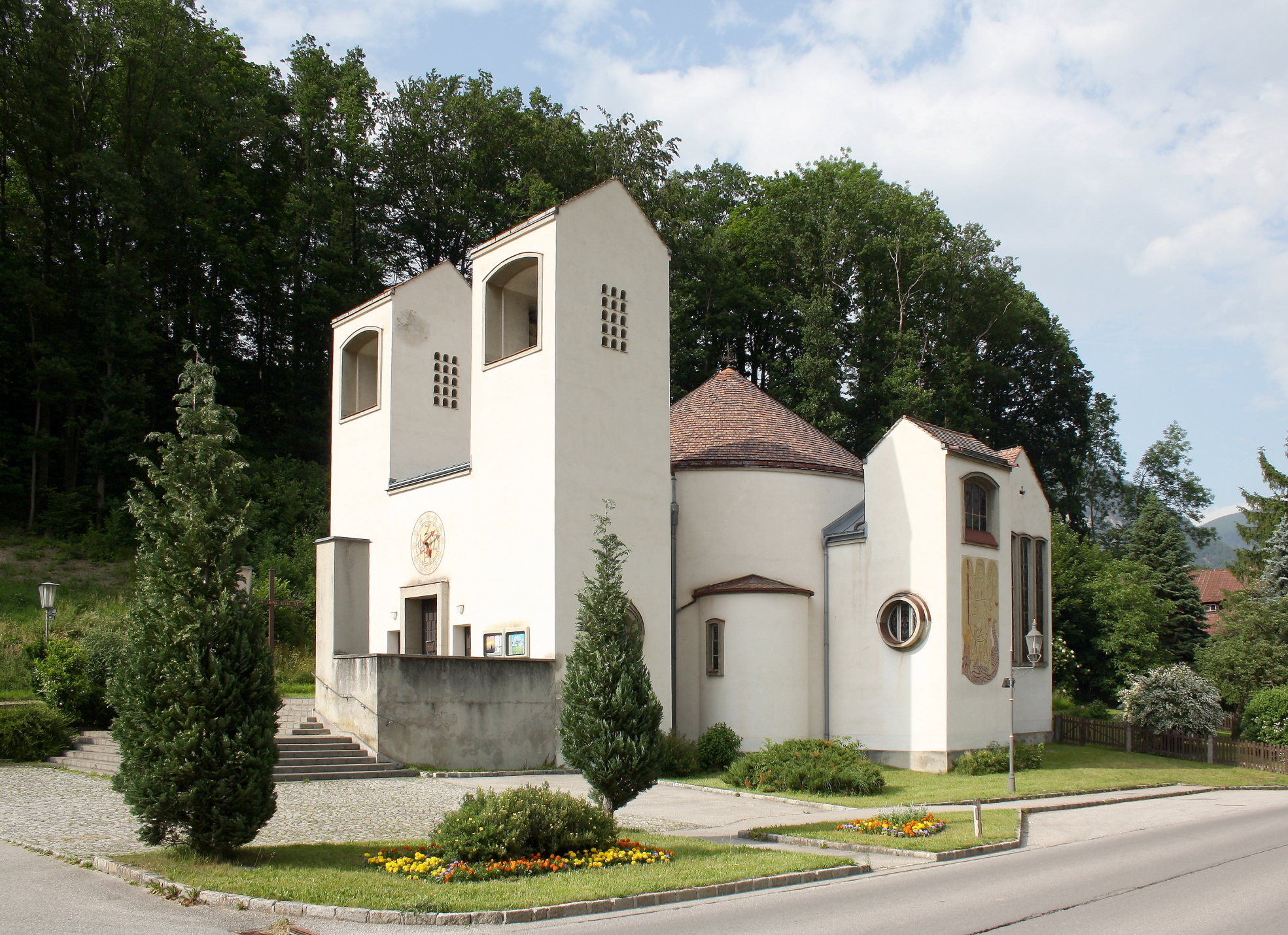 Die Pfarrkirche Hl. Geist in der Ortschaft Edlach an der Rax, Gemeinde Reichenau an der Rax. Ein tiefovaler Zentralbau, der in den Jahren 1938/39 nach Plänen von Robert Kramreiter als Filialkirche errichtet wurde. 1947 erfolgte die Erhebung zu einer Pfarrkirche.